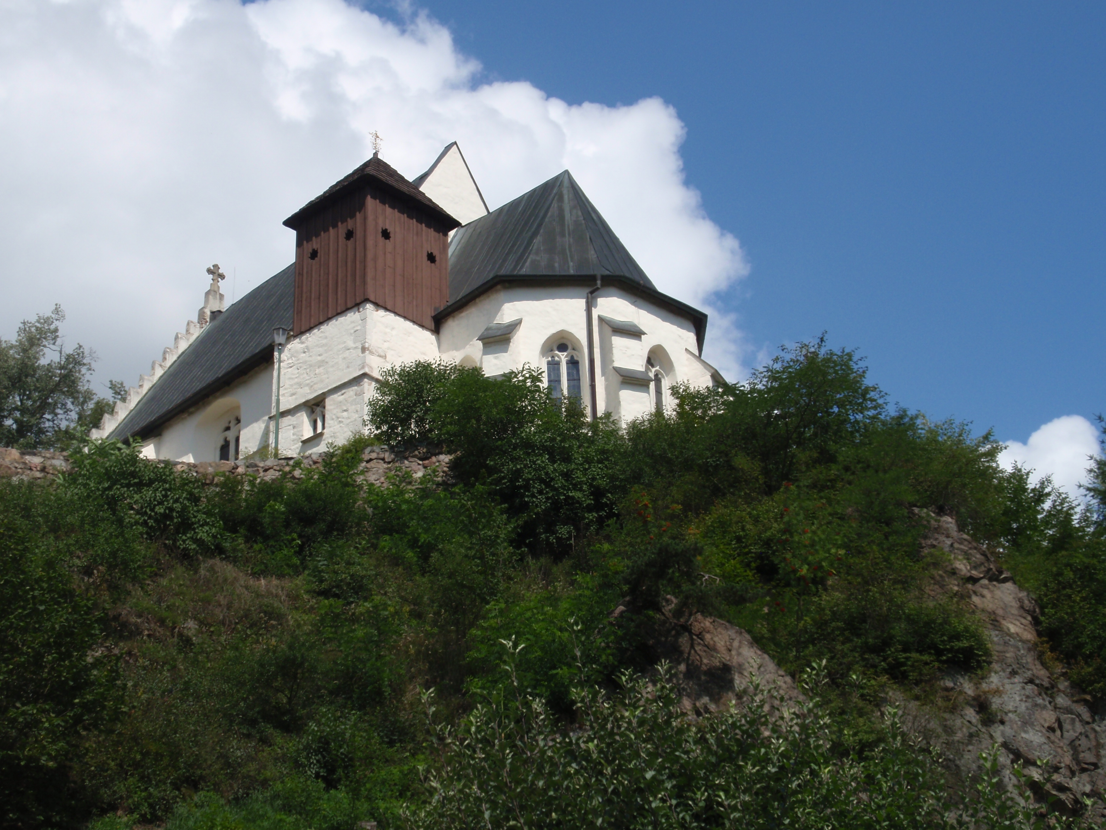 Kostel sv. Kateřiny (Svatá Kateřina), Svatá Kateřina